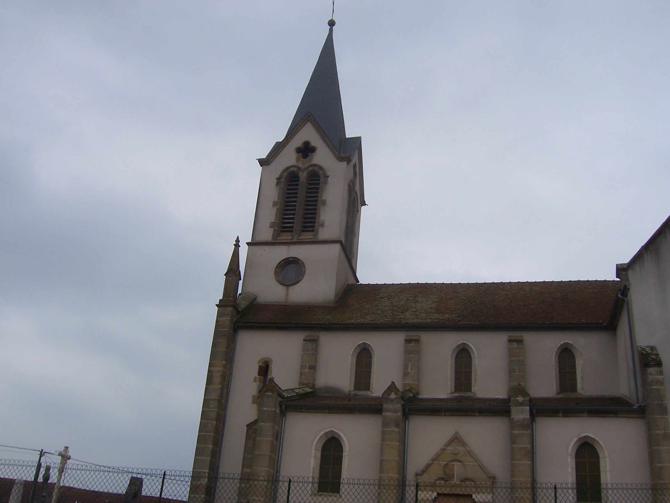 Eglise de Maligny